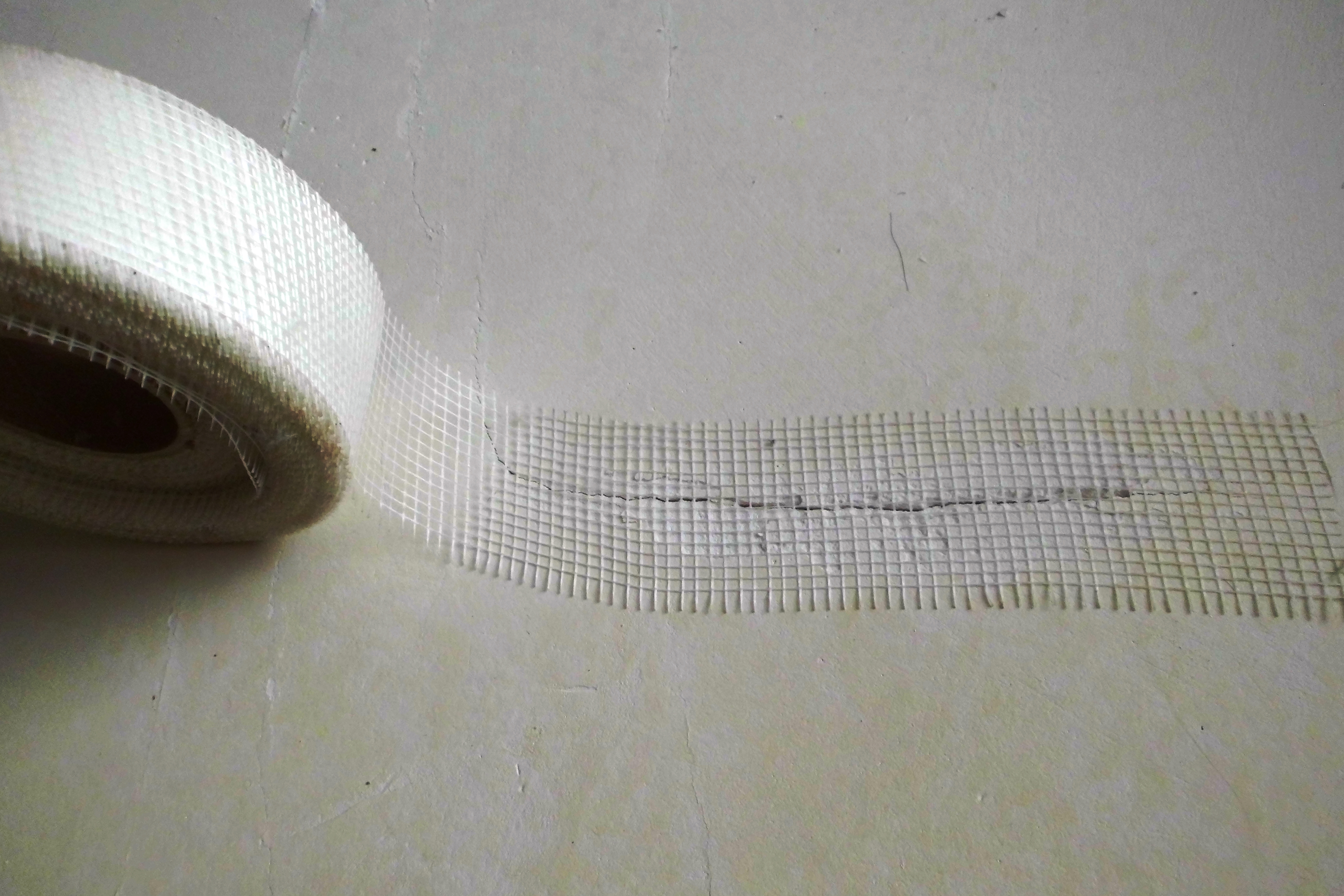 Серпянка с клеевым слоем наклеена на трещину в штукатурке.